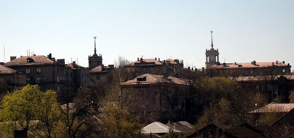 Houses with spires (Mariupol).jpg